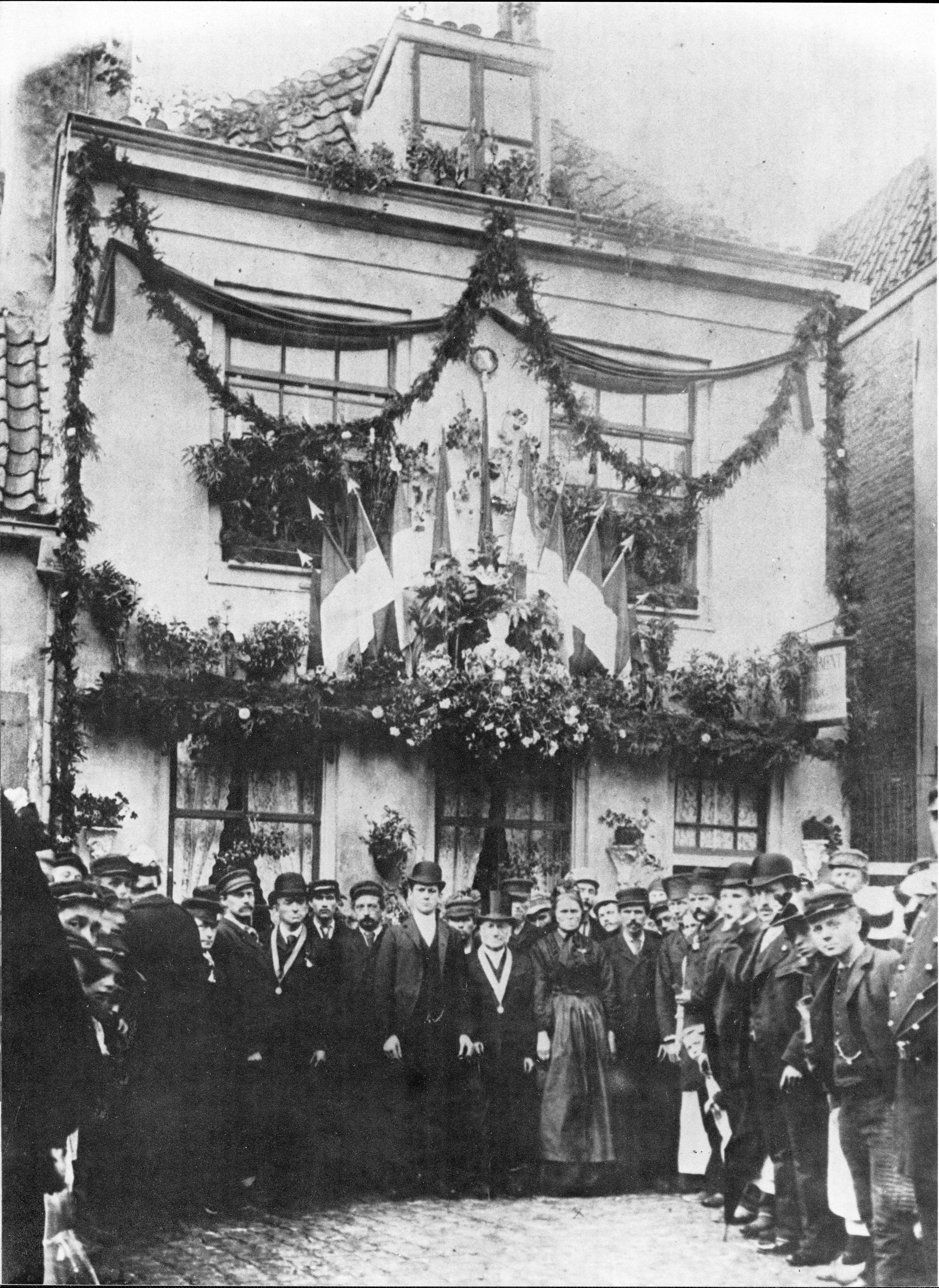 De Oranjestraat 54-55 tijdens het lustrumfeest van het Utrechtse Studentencorps in 1891